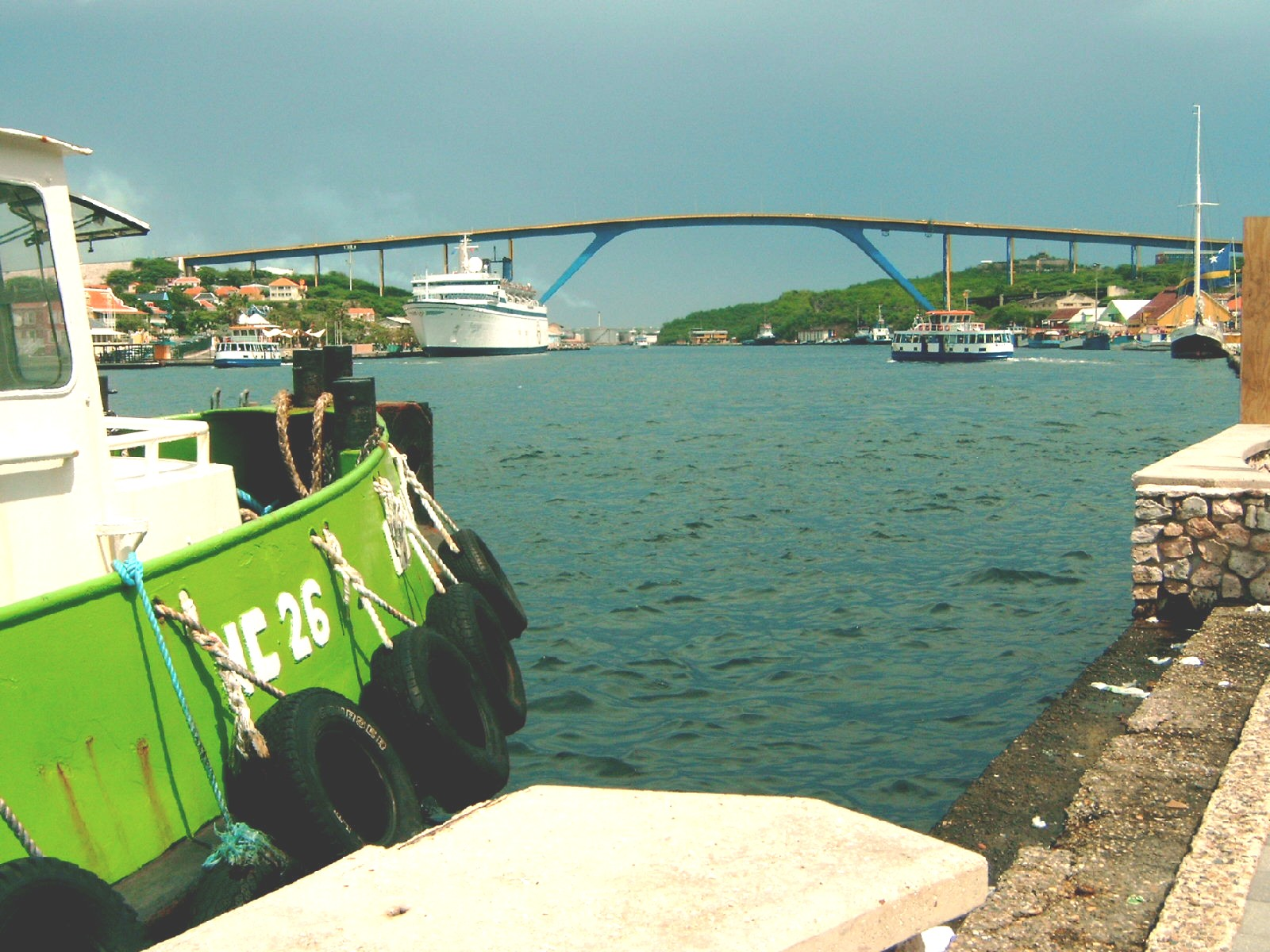 De Julianabrug over de Sint Annabaai op Curacao. Eigen opname, vrijgegeven voor publiek domein.